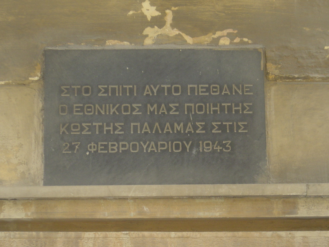 Υπέρθυρη επιγραφή στην Οικία Παλαμά, Πλάκα